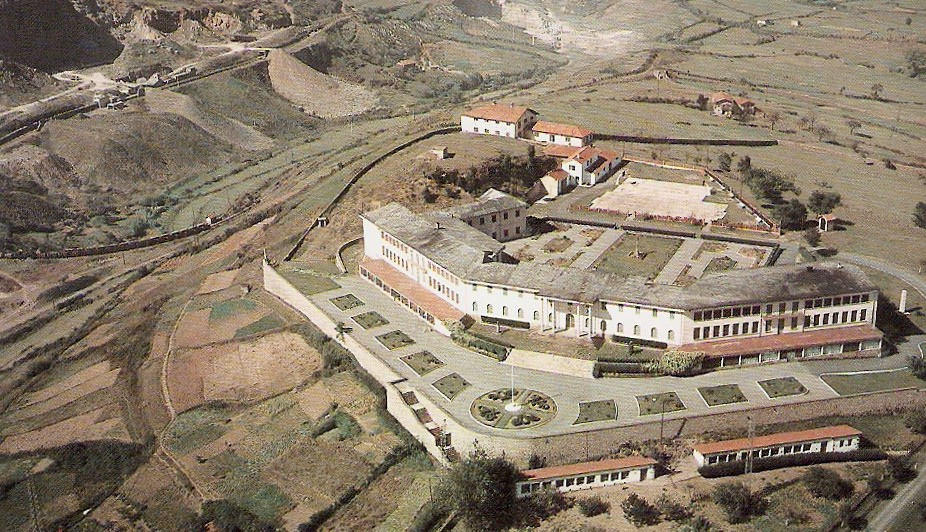 Enrique de Areilza sendagile-zirujau ospetsuak 1881. urtean Gallartako meatzari ospitaleari hasiera eman zion. Erietxe honetako mediku jarduerak, 1930. urtean itxi egin zuten arte iraun zuen. Gerra garaian tuberkulosidun gaixoei harrera egin zitzaien bertan. Gaixoei nahi adina janari ematen zitzaien, sendatzeko gainelikadura baten beharra zeukaten eta. Jarduera horretatik datorkio egungo Preventorio izena. Eraikinaren jabetza aldatu zen. 50eko hamarkadan Bizkaiko gobernadore falangistaren agindupean eraberritu ostean, Genaro Riestra eskola deituriko nesken barnetegi bat ireki zuten, non Espainia osotik etorritako neskek oinarrizko irakaskuntza jasotzen zuten. Franco hil ondoren, Buenos Aires eskola deituko da, izen bereko muinoan dagoelako. Baina eraikina, zaintze ezaren ondorioz, itxi egin behar izan zuten eta mendi magalean beste eskola bat eraiki zuten, alegia, Buenos Aires eskola, 1983an irekia.